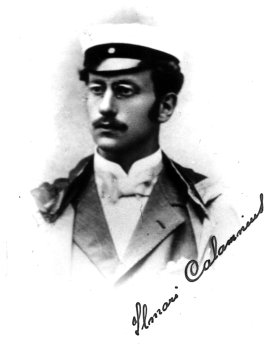 Ilmari Calamnius ylioppilaana